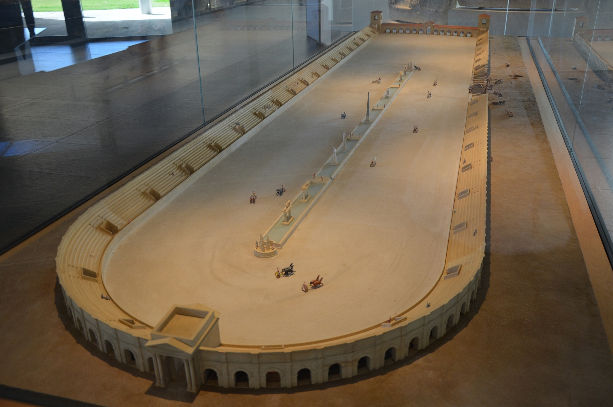 Musée de l'Arles antique, Arles, France